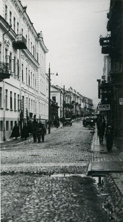 Беларуская (тарашкевіца): Вуліца Савецкая на скрыжаванні з Ажэшка